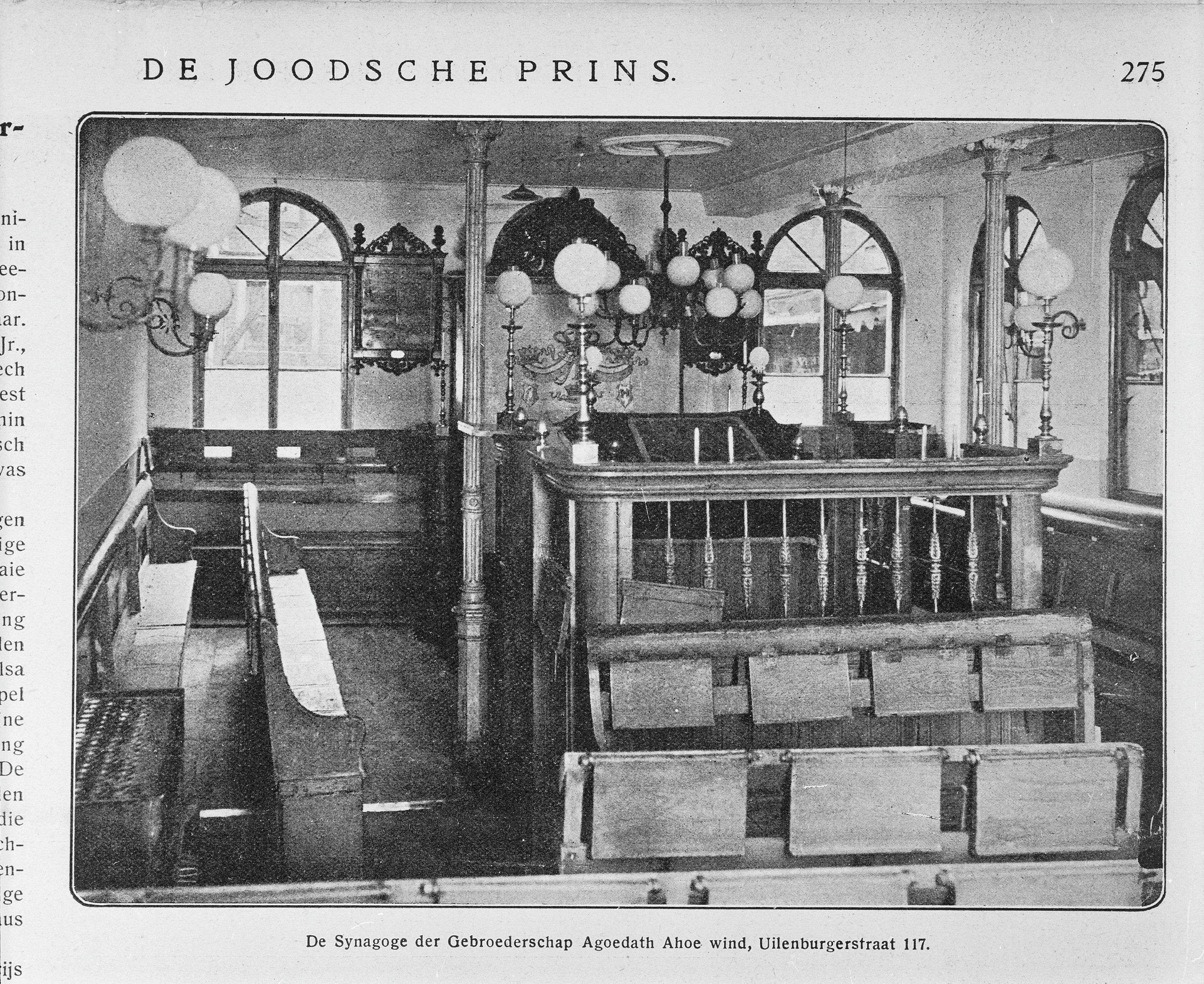 Voormalige synagoge: Interieur van de voormalige Uilenburger synagoge met biema (= verhoging voor het voorlezen van de Tora) (opmerking: Het onderschrift bij de foto: "De Synagoge der Gebroederschap Agoedath Ahoe wind, Uilenburgerstraat 117", noch het opschrift "De Joodsche Prins" hebben tot nadere identificatie geleid)